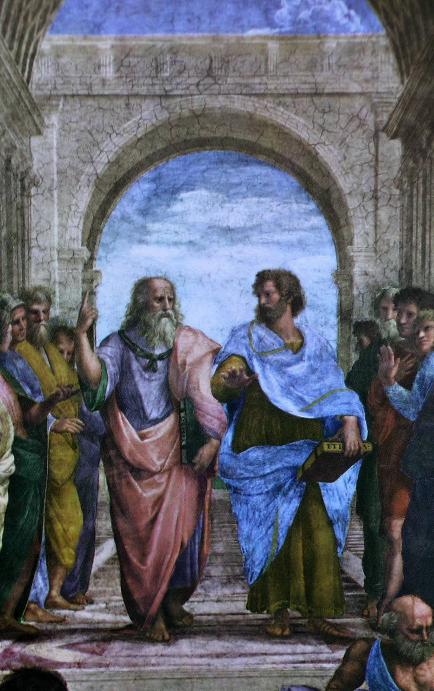 Ausschnitt aus der Philosophenschule (Stanzen) von Raffael